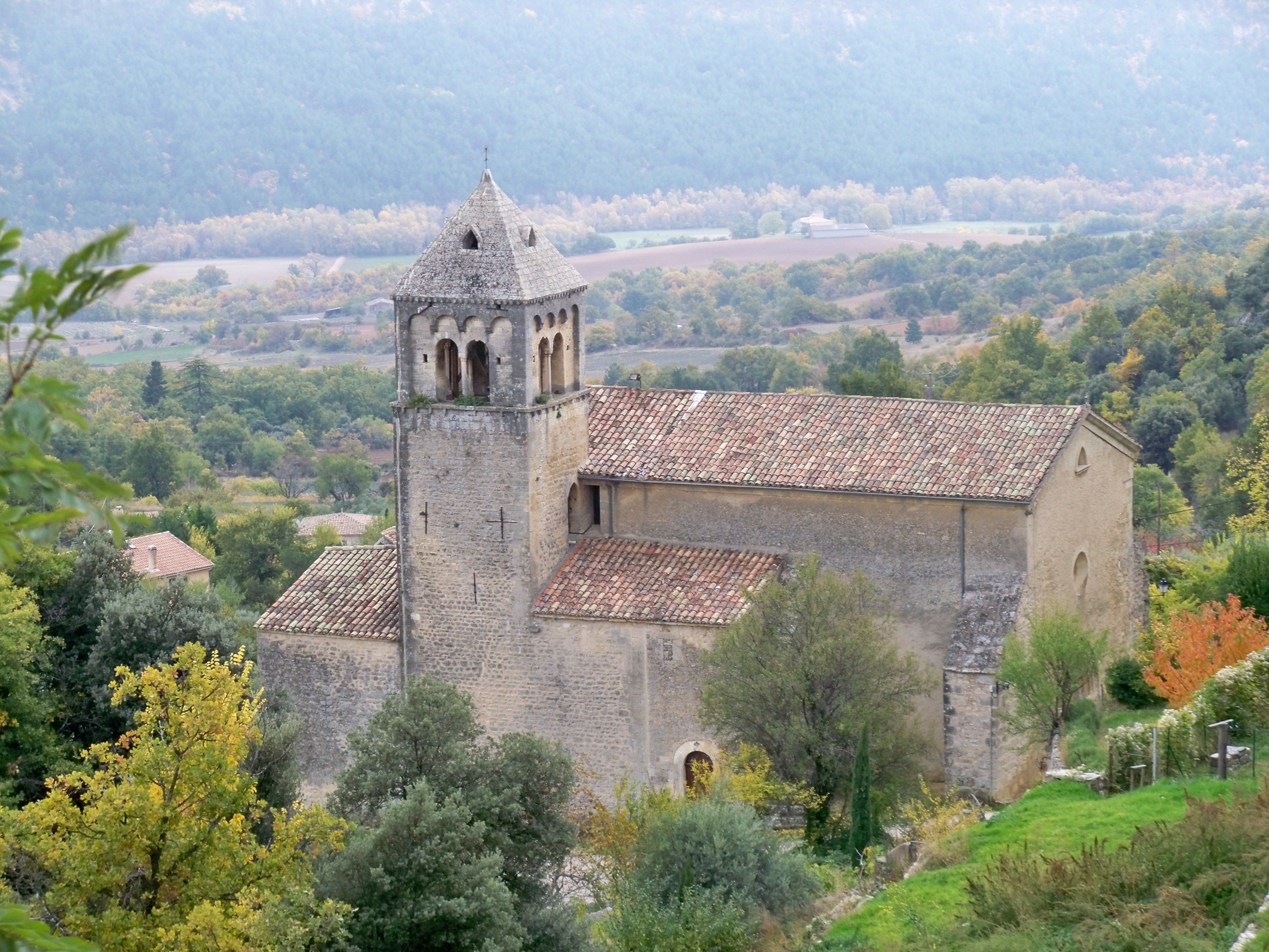 église de Viens, Vaucluse, France